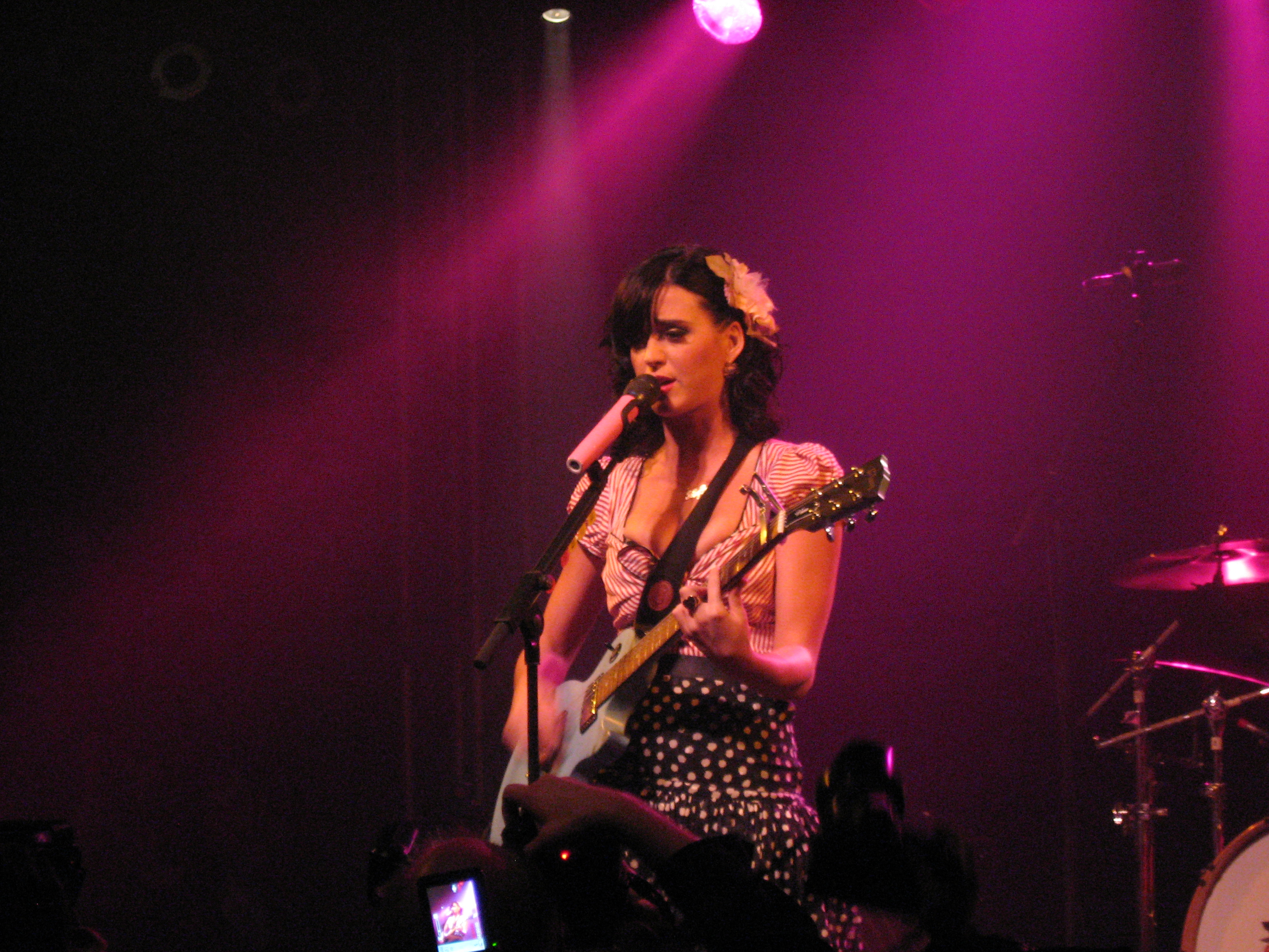 Katy Perry beim Live-Konzert im Postbahnhof in Berlin